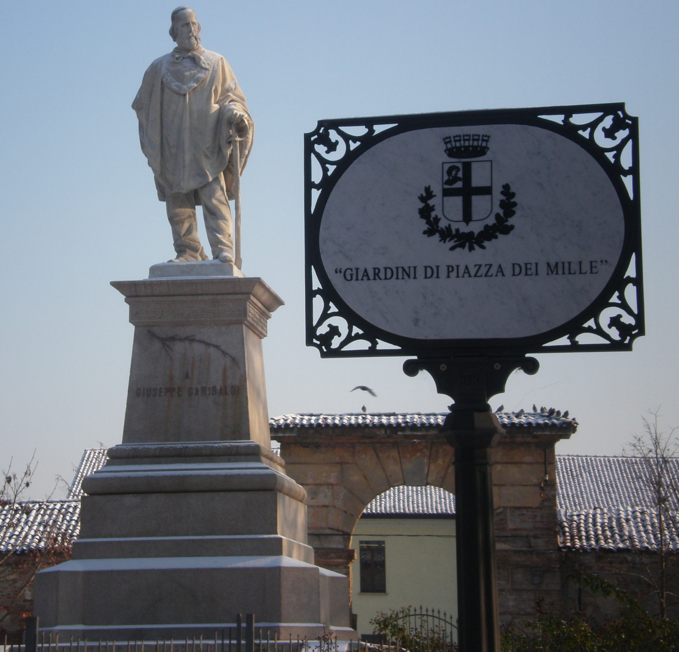 Monumento a Giuseppe Garibaldi in Piazza dei Mille a Mantova.